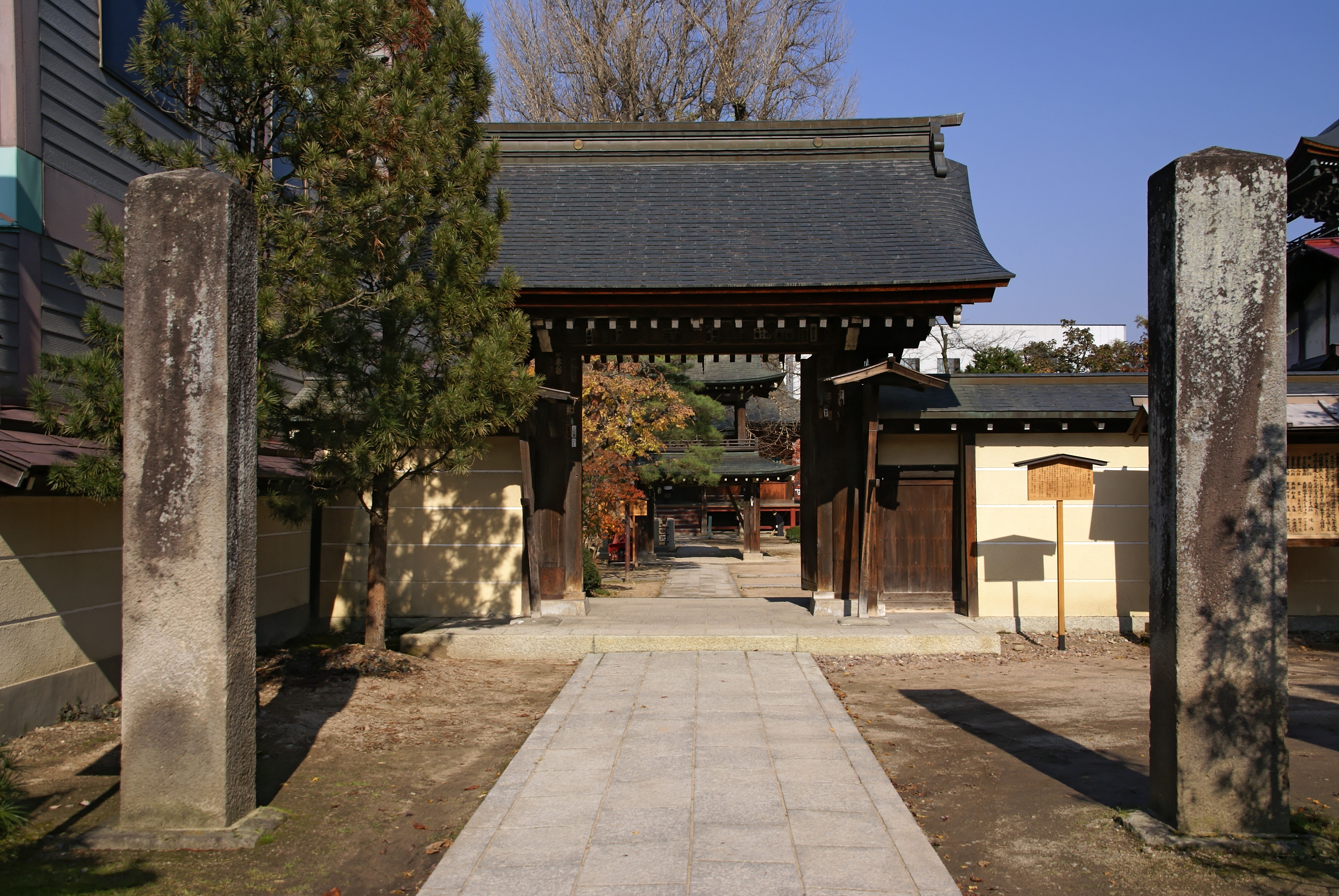 Hida-kokubunji in Takayama, Gifu prefecture, Japan